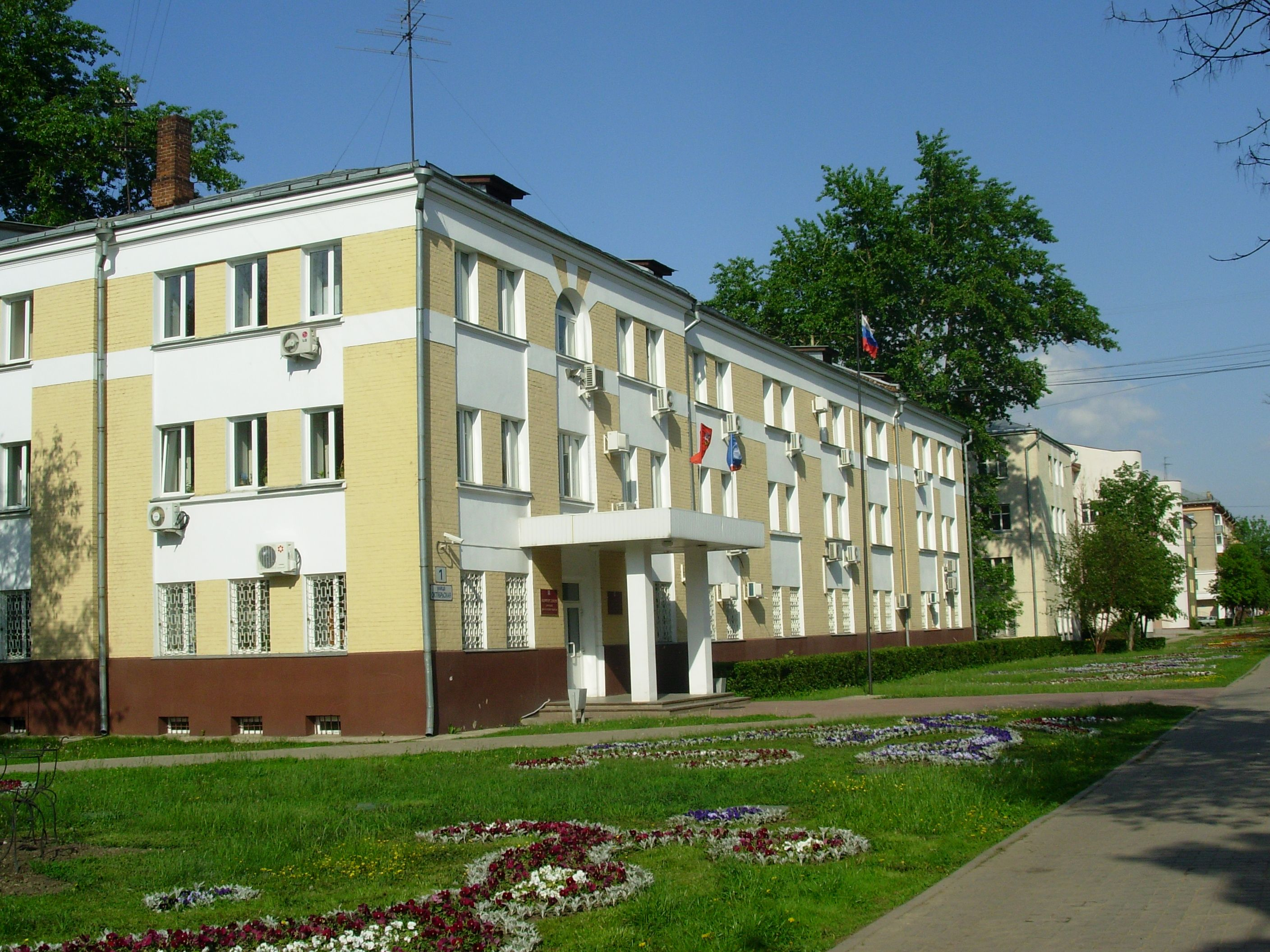 Город Королёв, улица Октябрьская, дом 1, здание городской администрации